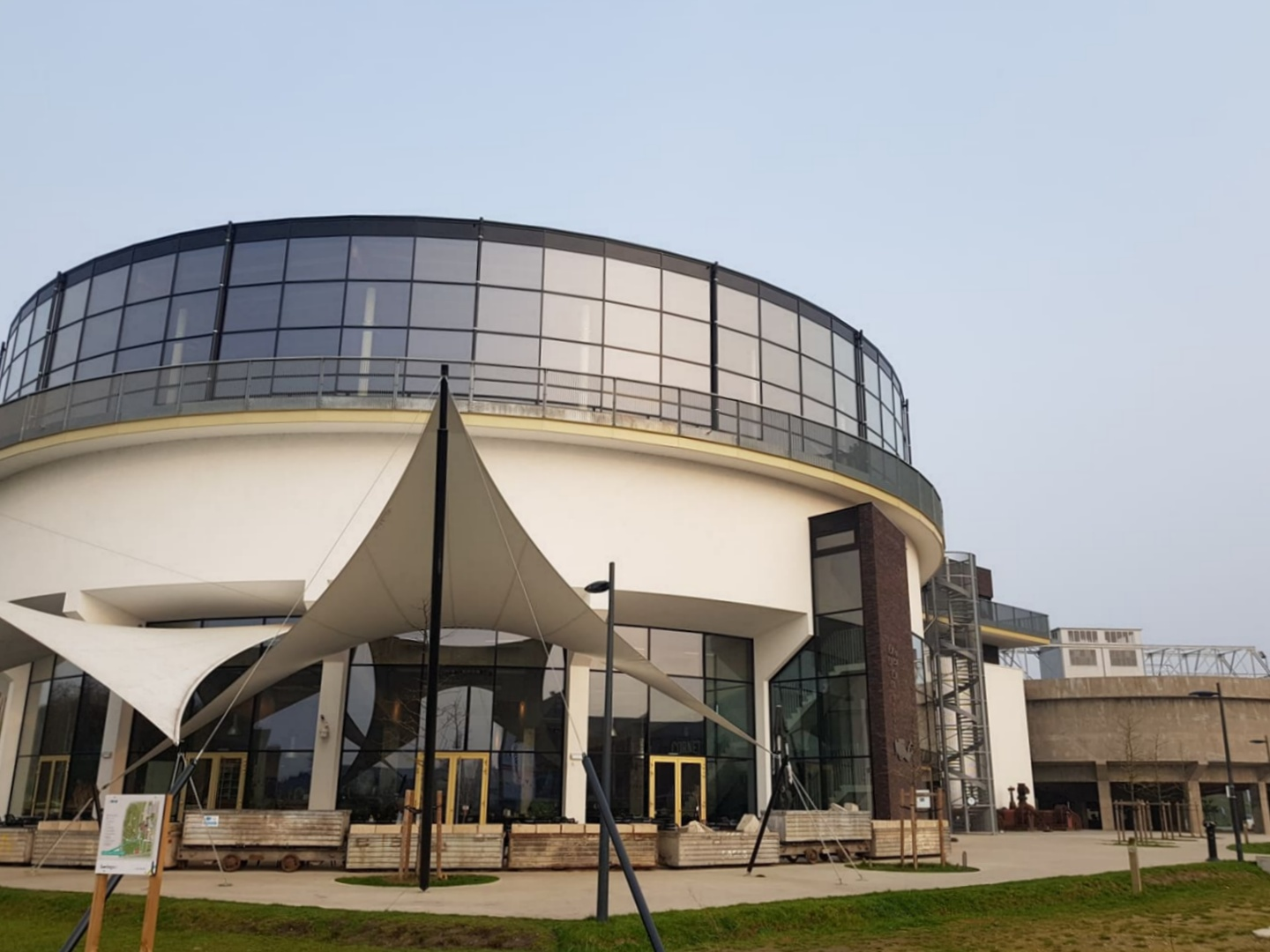 Duikcentrum Todi te Beringen